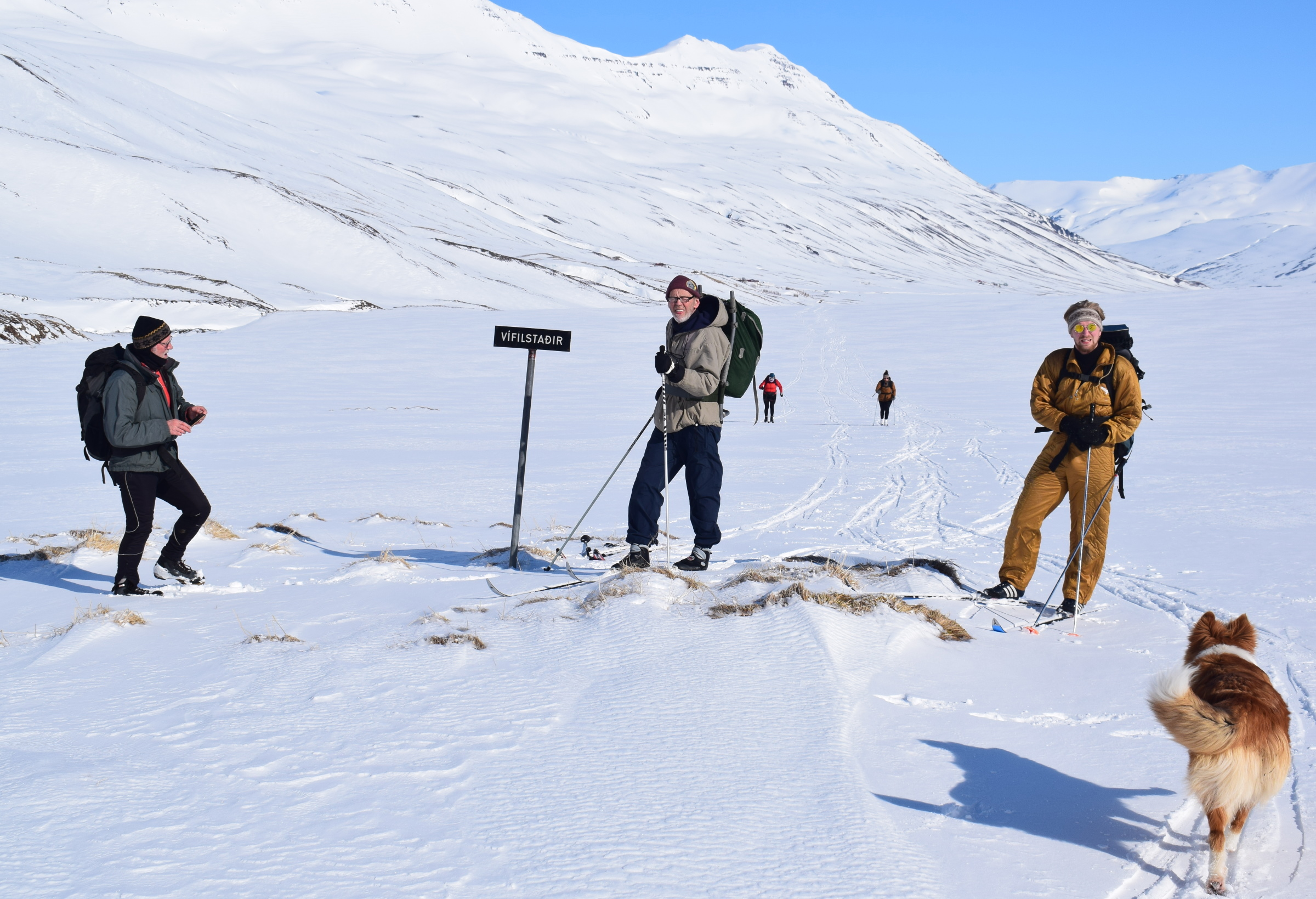 Vífilsstaðir er fornt eyðibýli innst í Svarfaðardal